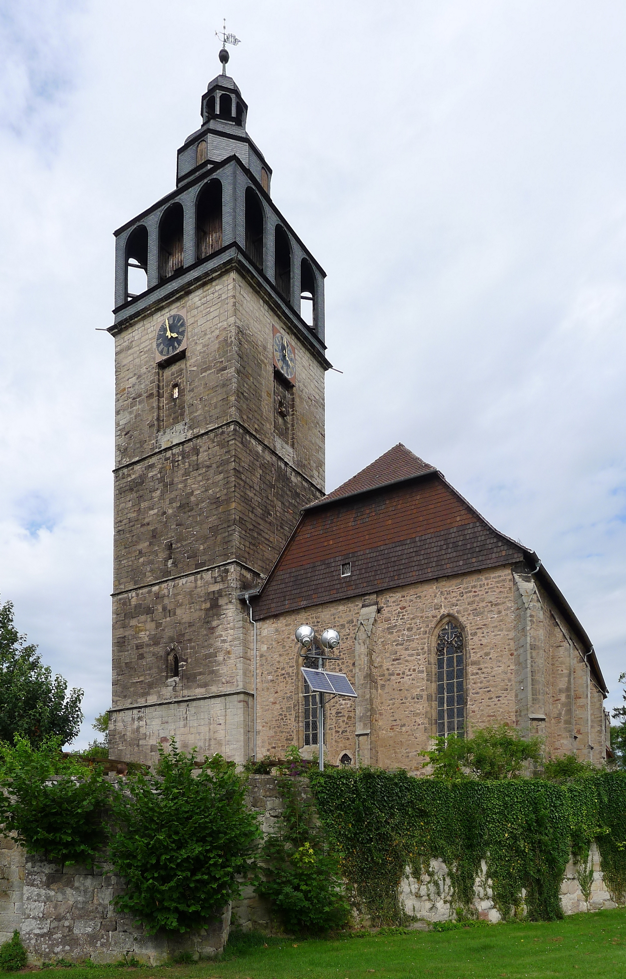 Blick vom Ufer der Werra